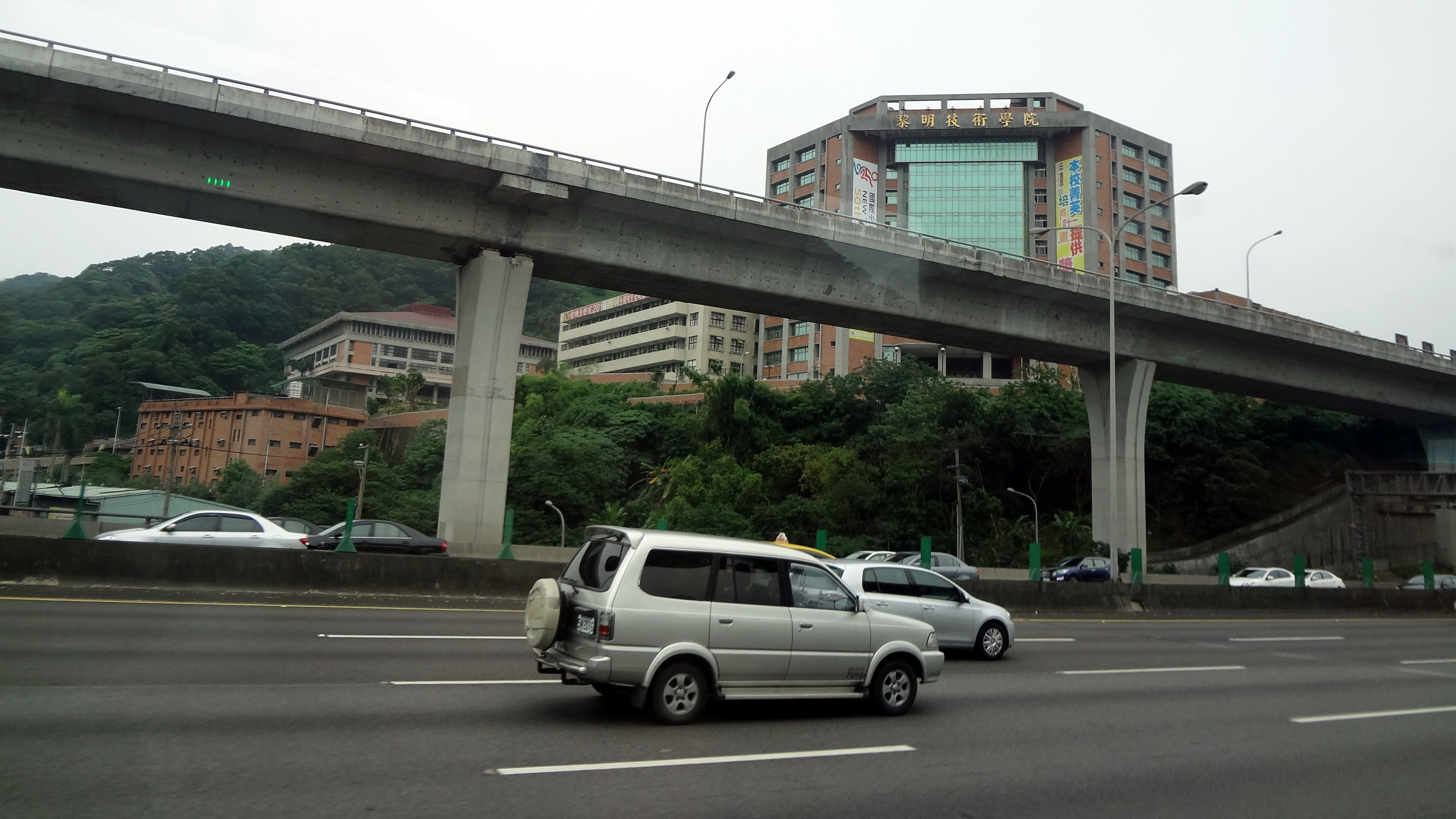 黎明技術學院，位於臺灣新北市泰山區泰林路三段22號。本照片係於高速公路上拍攝。